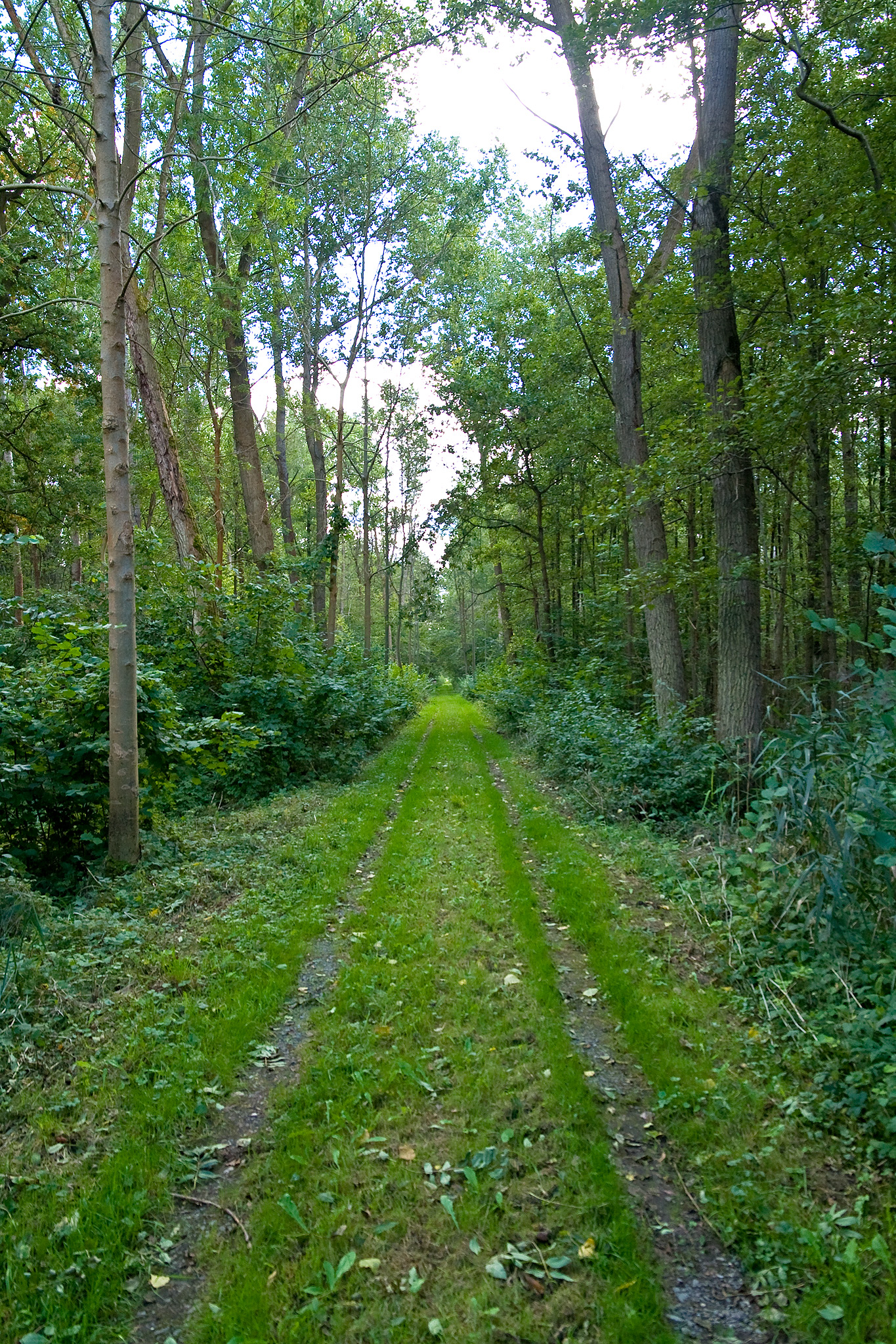 Verlauf der ehemaligen Bahnstrecke Salzwedel-Lüchow im Wald bei Hoyersburg.